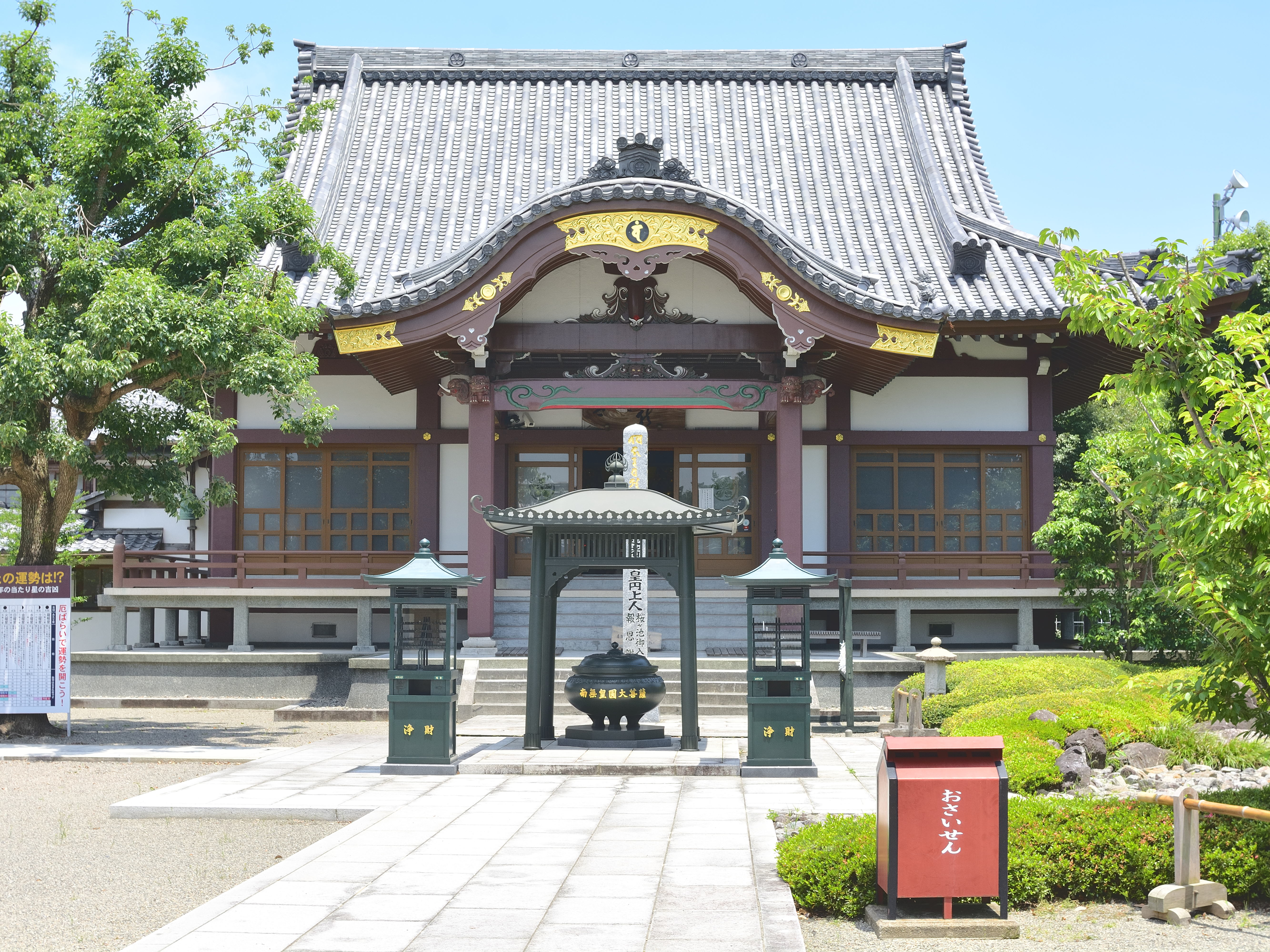 蓮華院誕生寺の本堂正面